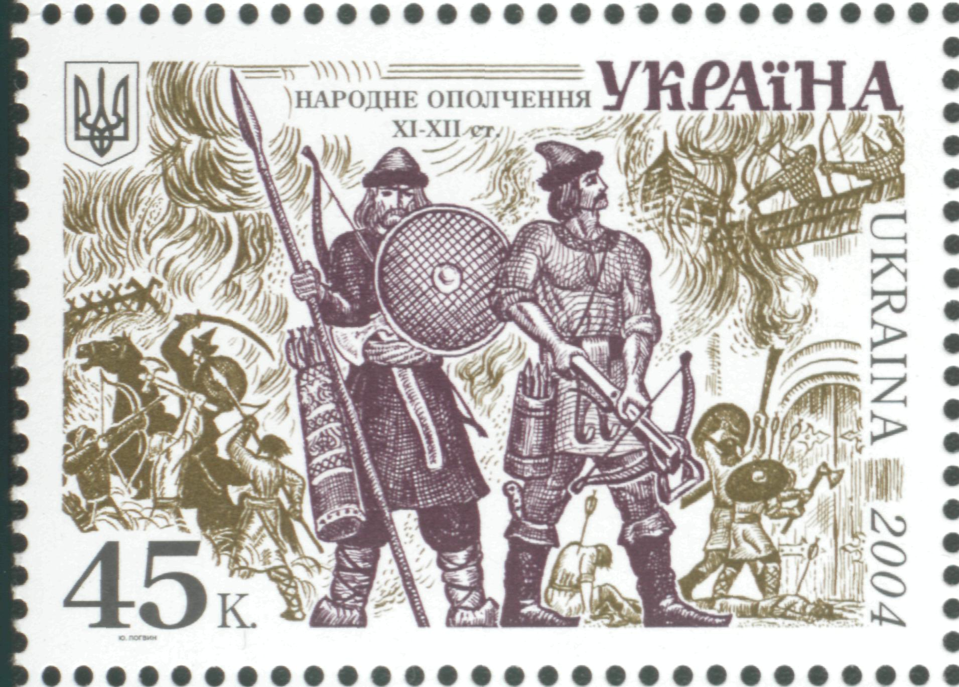 Почтовая марка из серии История Украины. Народное ополчение 11-12 веков. 2004.